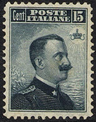 Immagine raffigurante francobollo noto come Michetti a destra e proveniente da collezione personale dell'autore